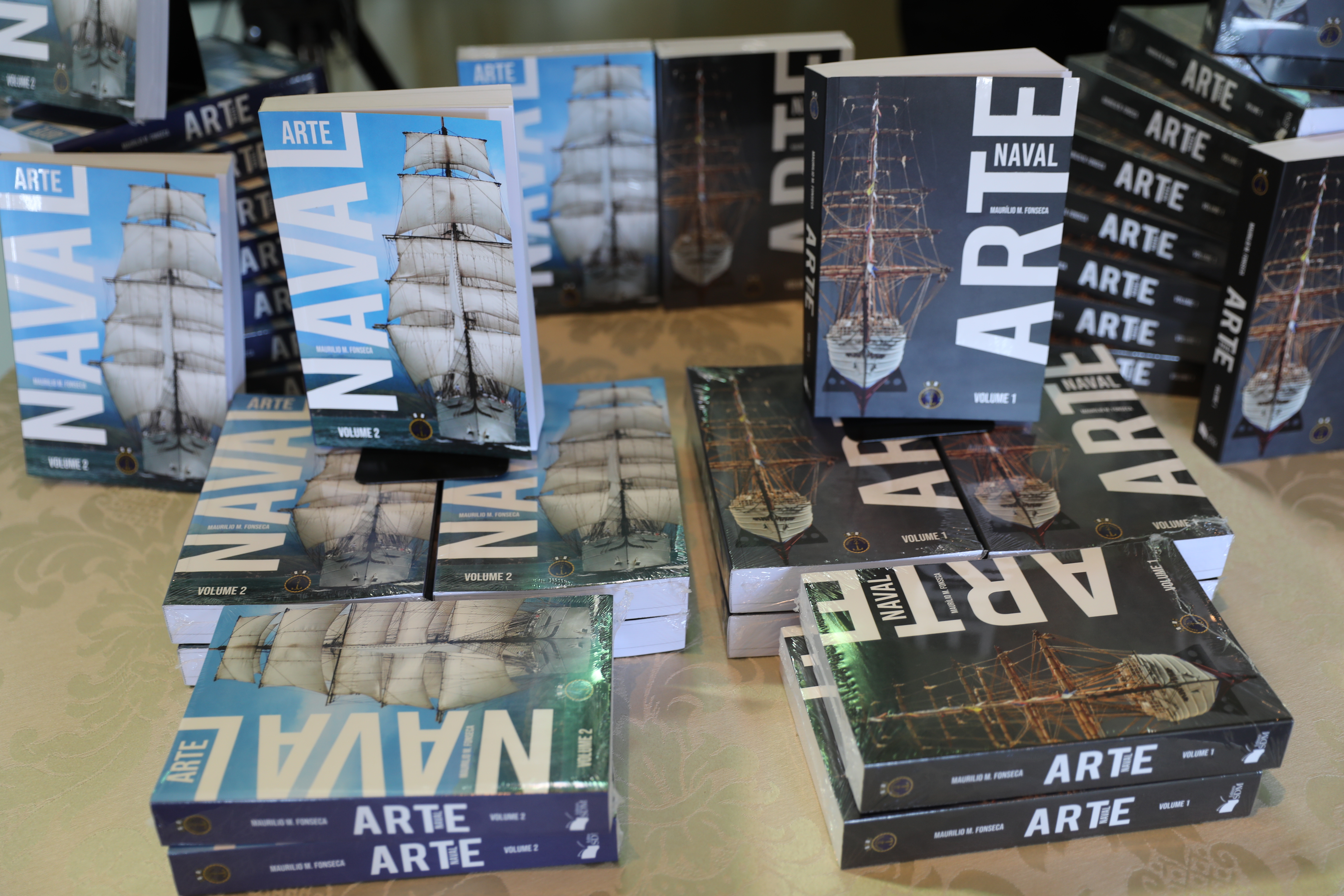 Cerimônia comemorativa dos 75 Anos da DPHDM e lançamento da 8. Edição do livro Arte Naval publicado pela editora do Serviço de Documentação da Marinha